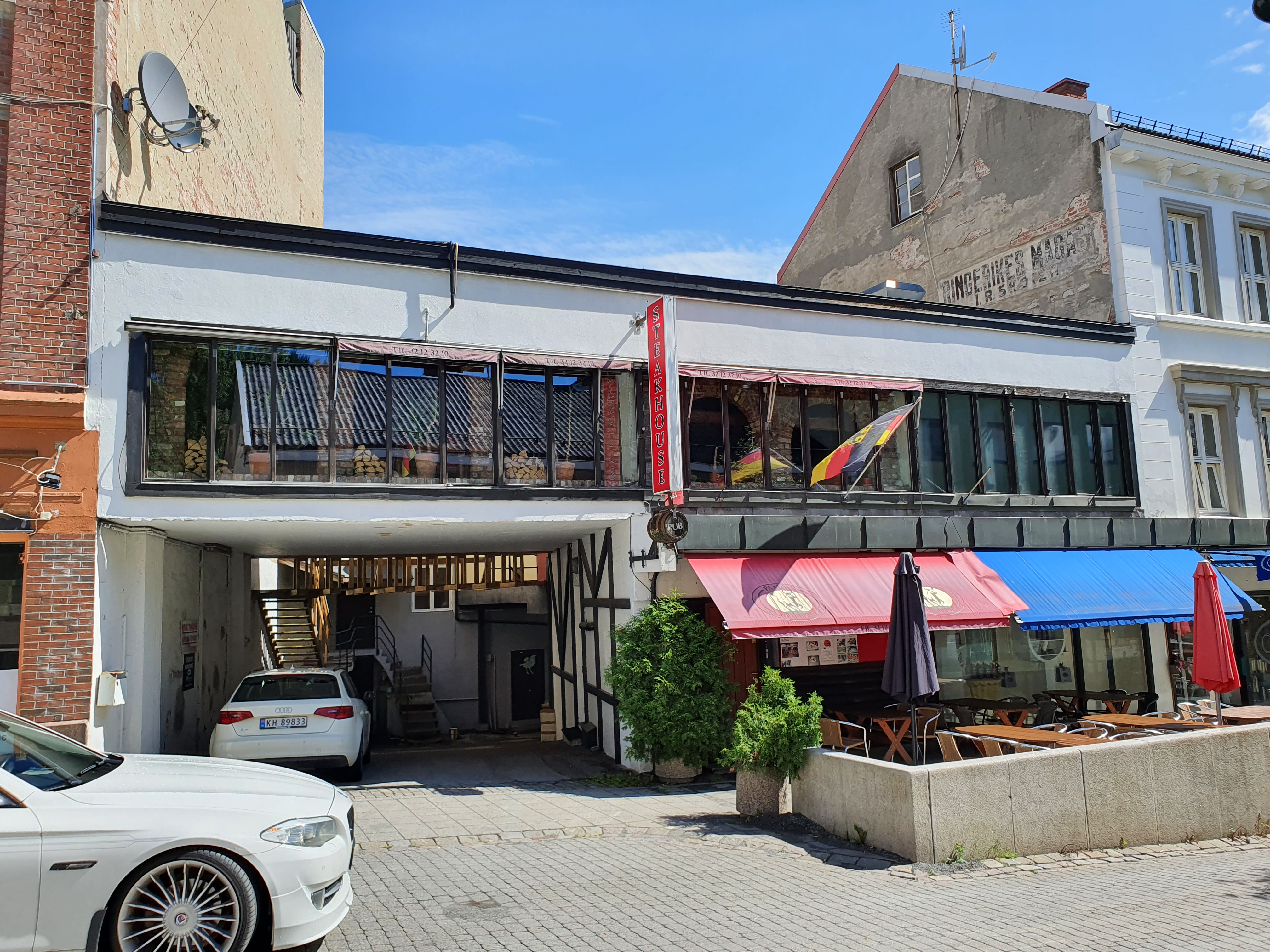 Det siste tilbygget til Wexhalgården